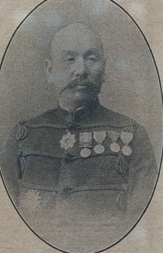 佐野延勝男爵（1849～1915）